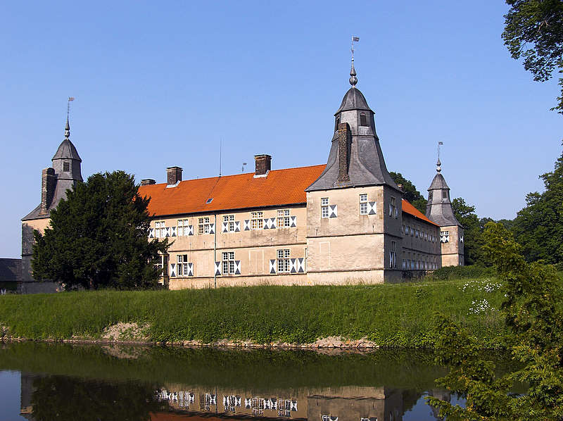 Schloss Westerwinkel - Blick Richtung Süd-West